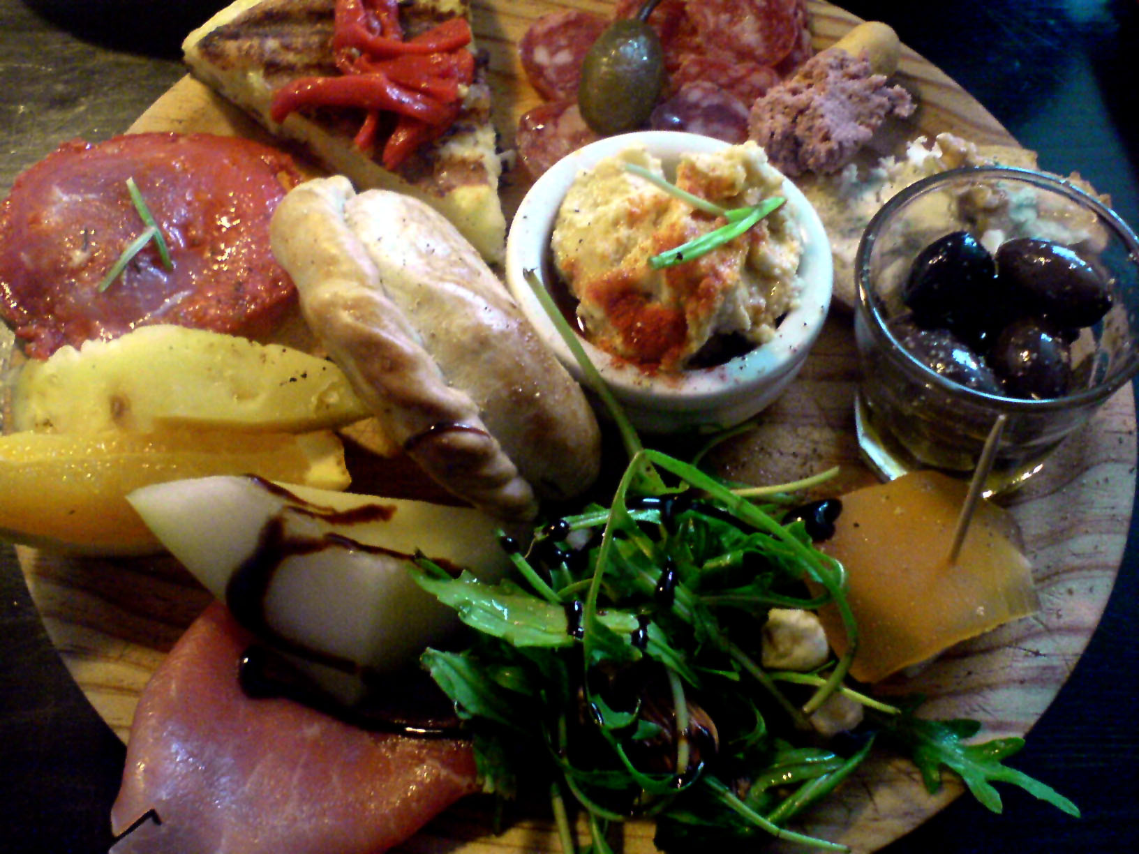 Serranoskinke, frugt, pølse, tortilla, oliven, manchego, salat, hummus og empanadas